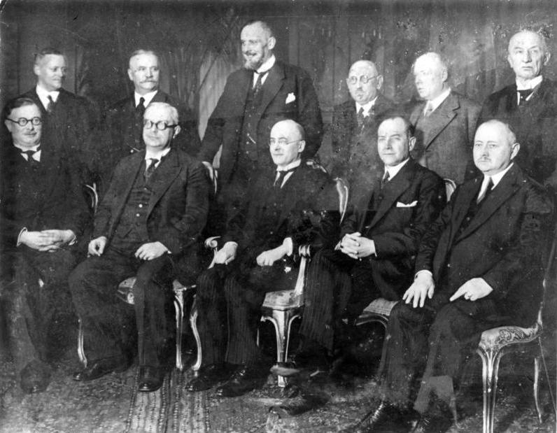 Zentralbild Die neue deutsche Reichsregierung nach dem ersten Ministerrat 31.3.1930. UBz: von links sitzend: Joseph Wirth (Inneres), Hermann Robert Dietrich (Wirtschaft), Heinrich Brüning (Reichskanzler), Julius Curtius (Äußeres), Georg Schätzel (Post), stehend: Gottfried Reinhold Treviranus (Besetzte Gebiete), Martin Schiele (Landwirtschaft), Johannes Viktor Bredt (Justiz), Adam Stegerwald (Arbeit), Paul Moldenhauer (Finanzen), Theodor von Guérard (Verkehr). (Der Reichswehrminister Wilhelm Groener fehlt auf dem Bild)! Information added by Wikimedia users. Kabinett Brüning I 30. März 1930 – 10. Oktober 1931